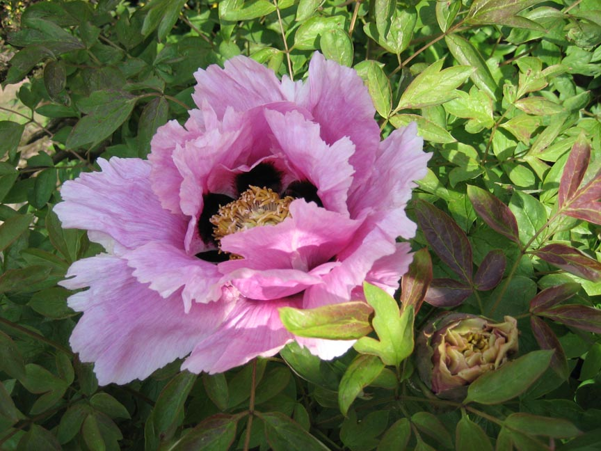 Paeonia rockii - photo MPF 10:33, 18 May 2005 (UTC)